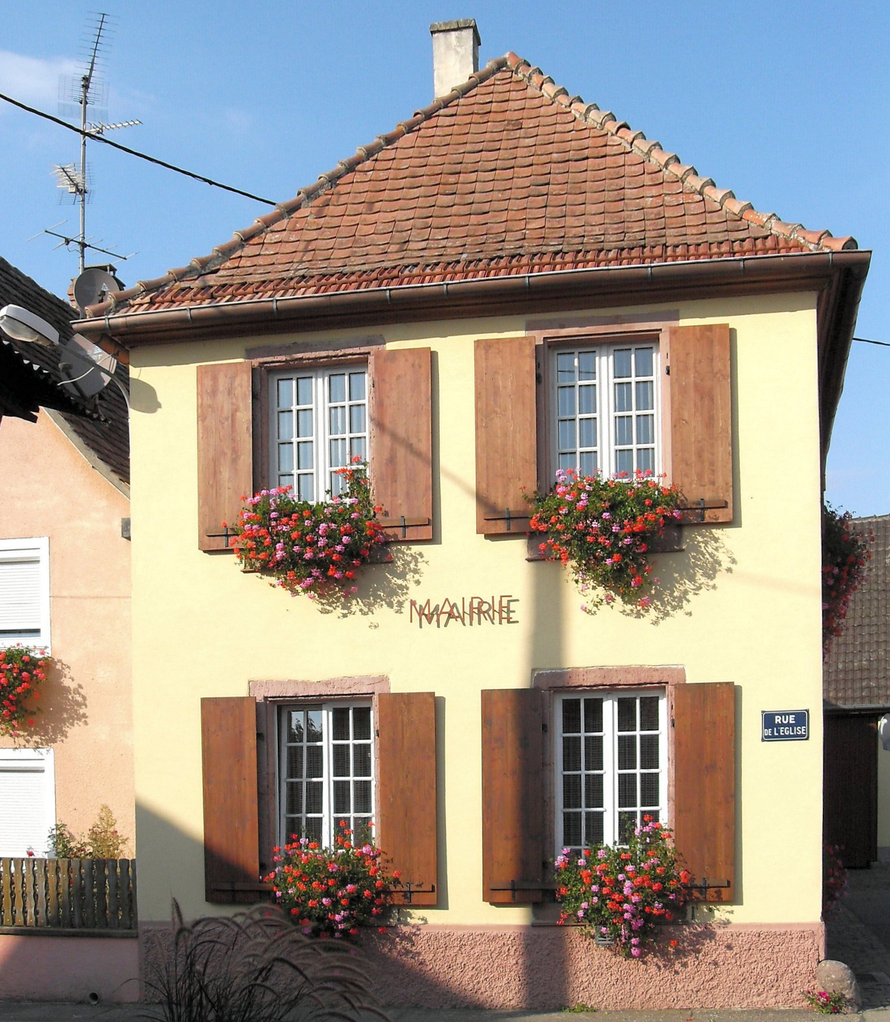 La mairie de Riedwihr